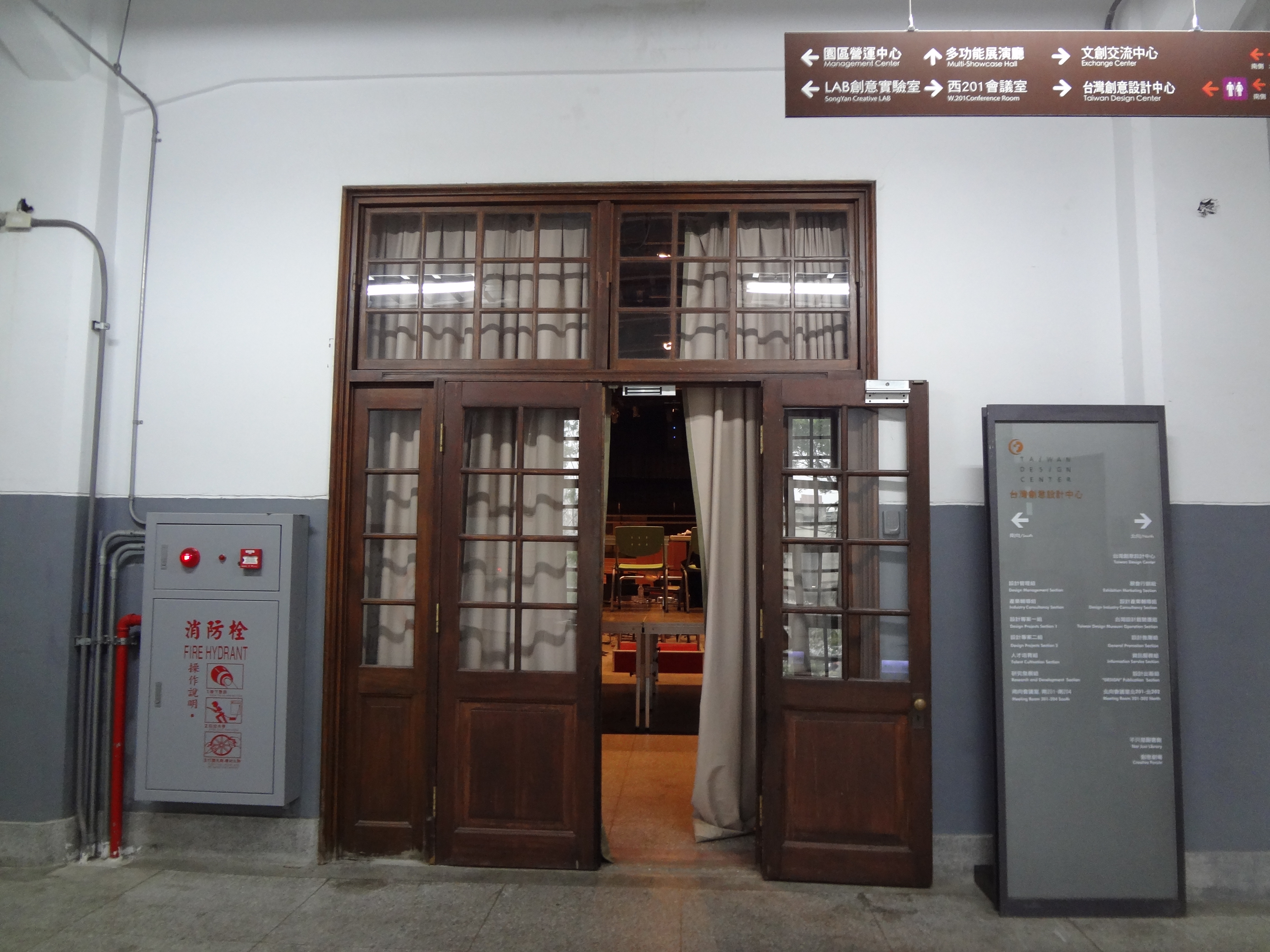 中文（台灣）: 臺北市松山文化創意園區製菸工廠西側二樓，多功能展演廳。